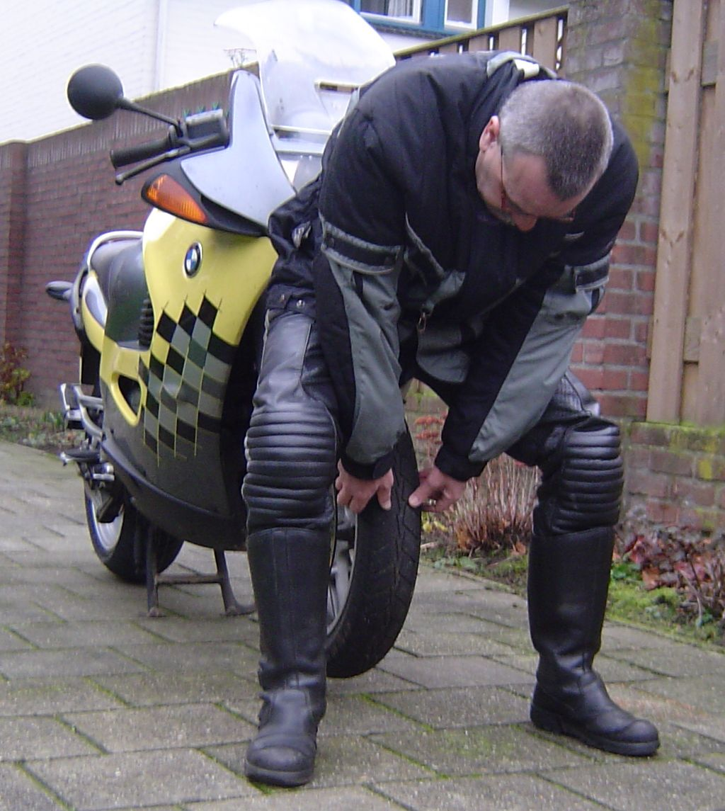 BORVAS staat voor: Banden, Oliepeil, Remmen, Verlichting en Vering, Aandrijving en Spiegels. Handigheidje voor het controleren van de voorband